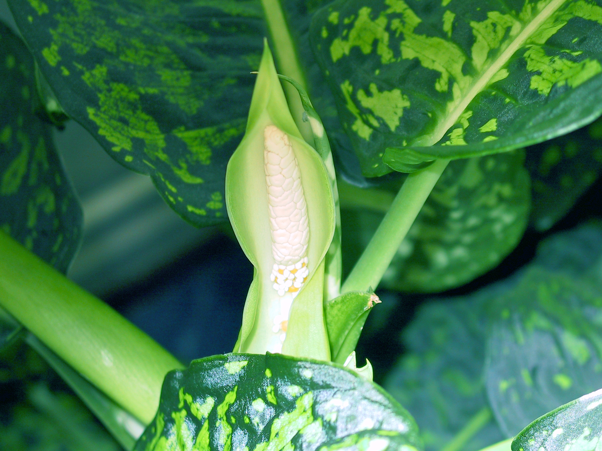 Blüte einer Dieffenbachia in Nahaufnahme